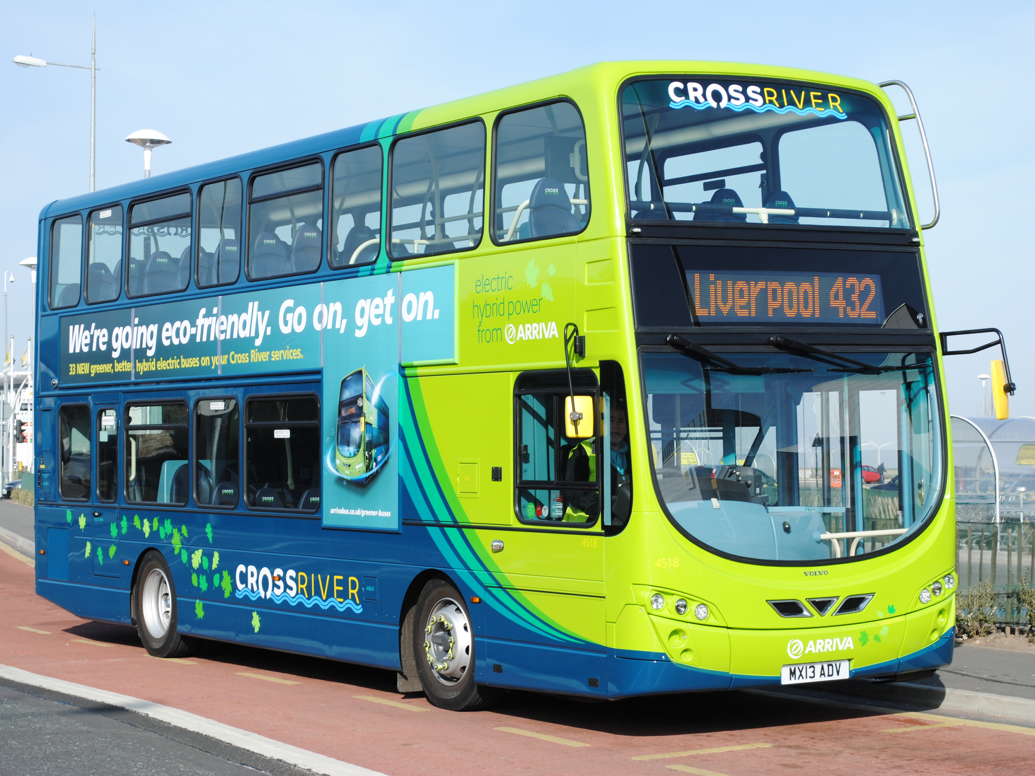 Volvo B5L Wright Gemini 2 Hybird